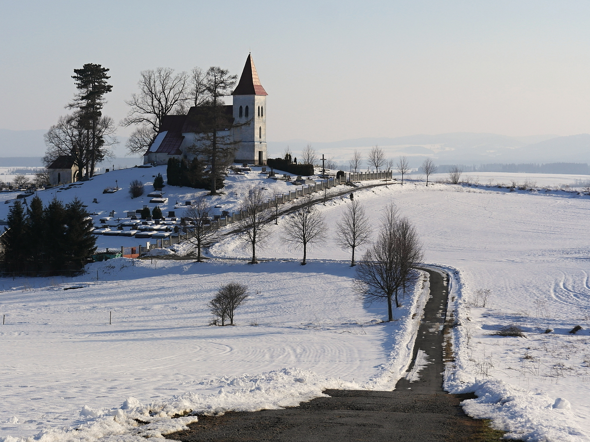 038 22 Abramová, Slovakia